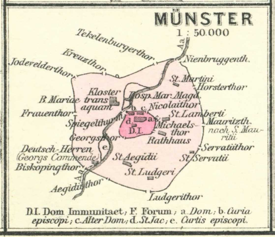 Münster gegen Anfang des XIII. Jahrhunderts